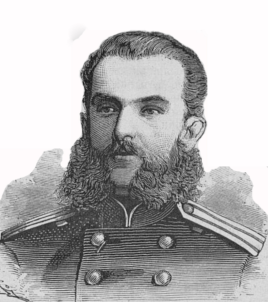 Ореус, Михаил Фёдорович, 1878 год Чин/звание: «Генерал от артиллерии» Знаки различия на картине: погоны «Полковник».